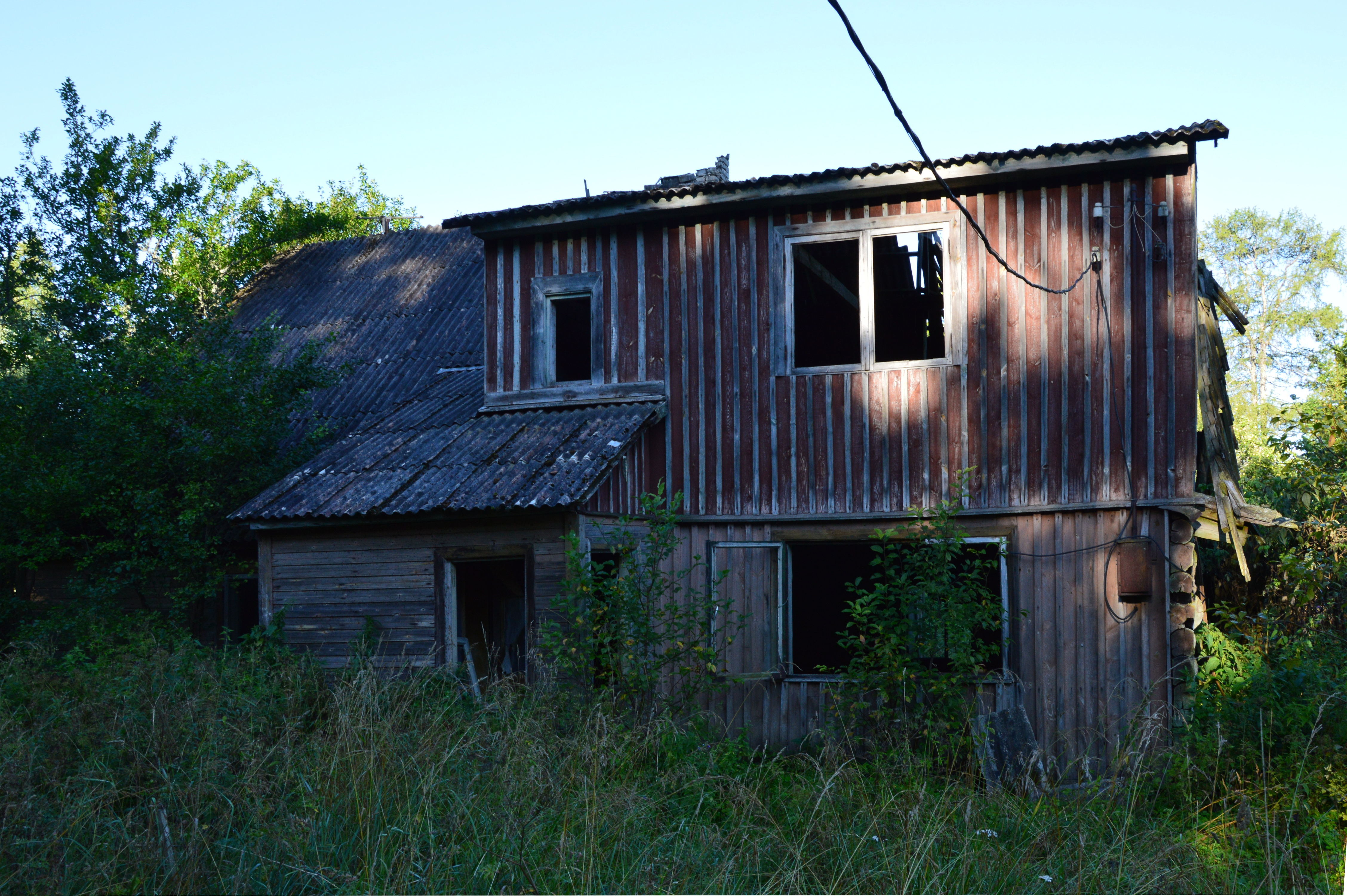 Matthias Johann Eiseni sünnikodu